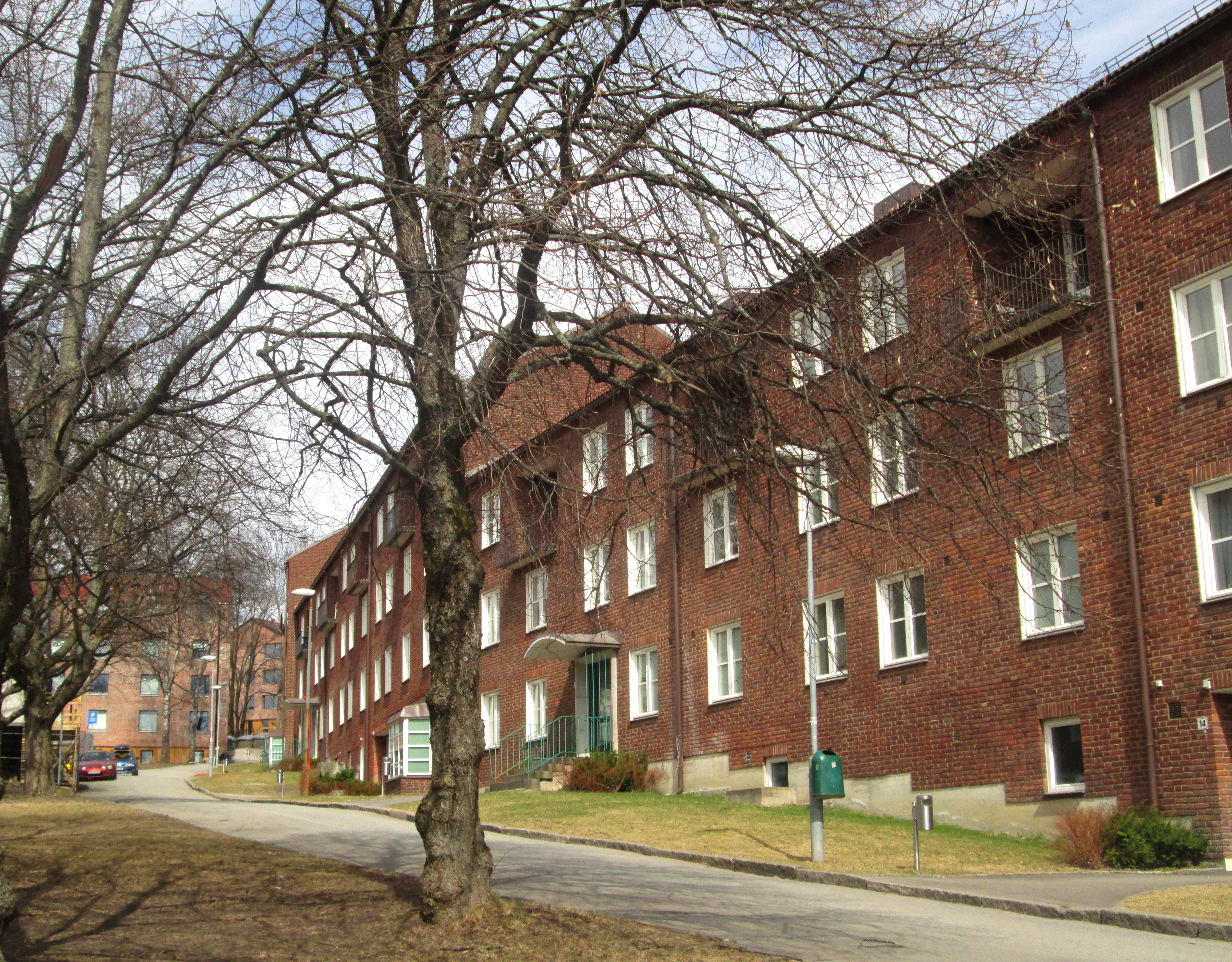 Motiv fra Jon P. Erliens vei i Sogn studentby i Oslo, bydel Nordre Aker. Vi ser det som opprinnelig var hus 2 på Sogn studentby, i dag med adresse Jon P. Erliens vei 4–14.